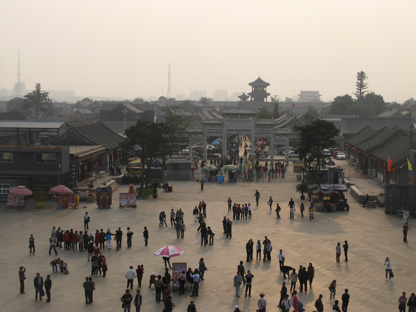 "First Pass Under Heaven", Shanhaiguan / 天下第一关，河北省山海关